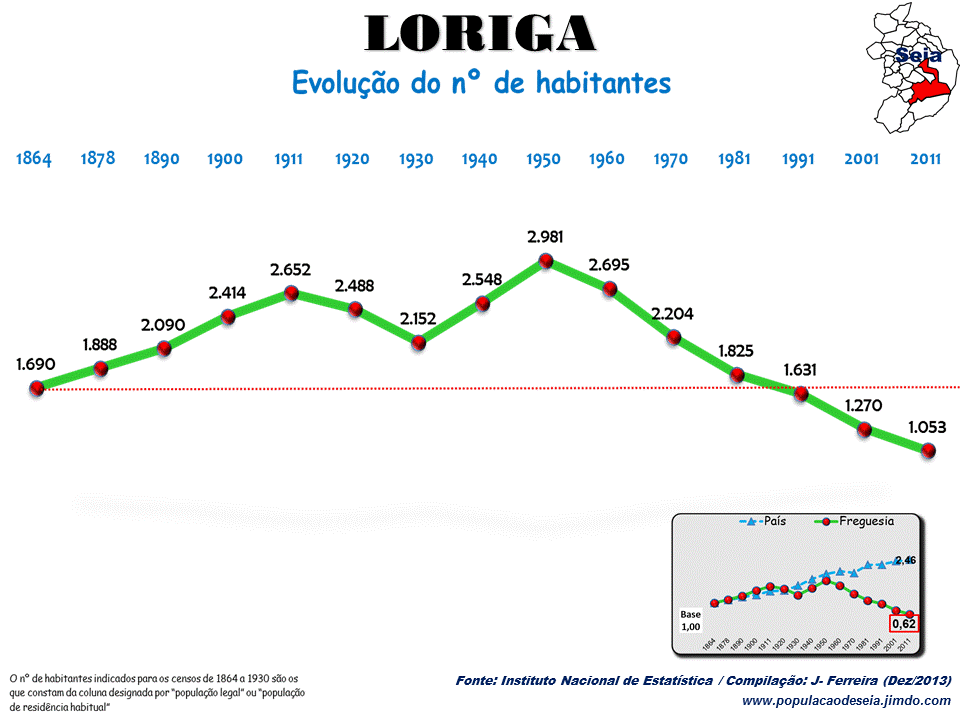 Evolução da População 1864 / 2011